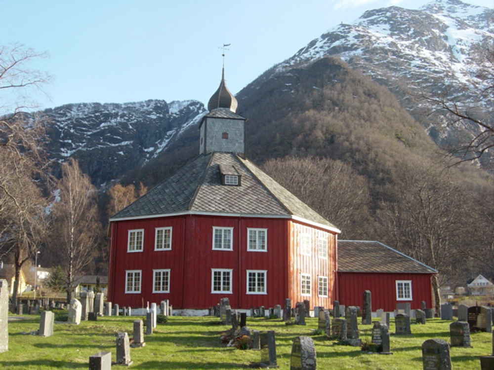 Grytten church, Åndalsnes, in Norway